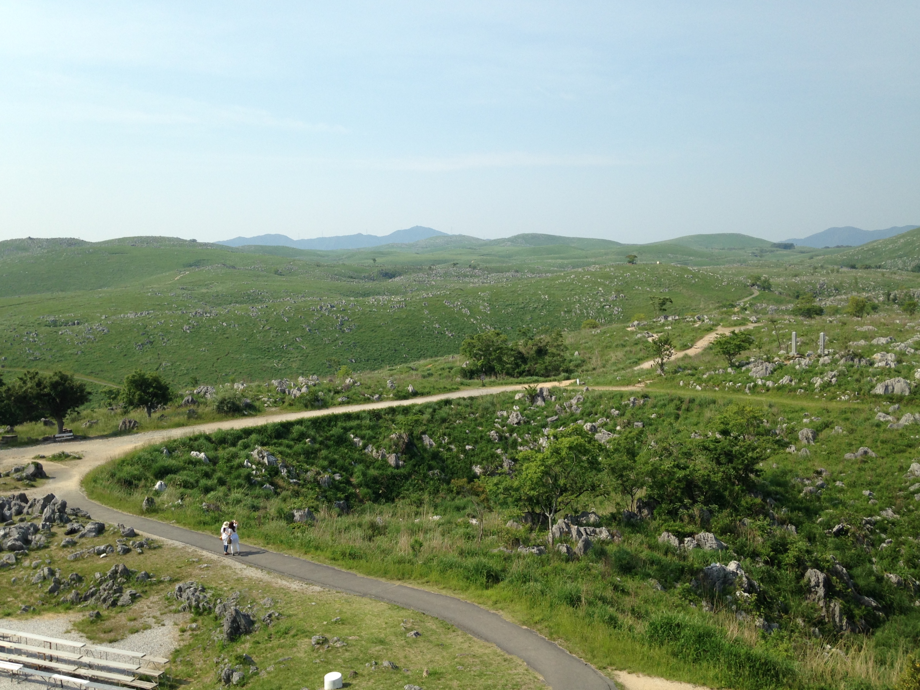 秋吉台カルスト展望台より望む秋吉台(桂木山・鯨ヶ岳方面)